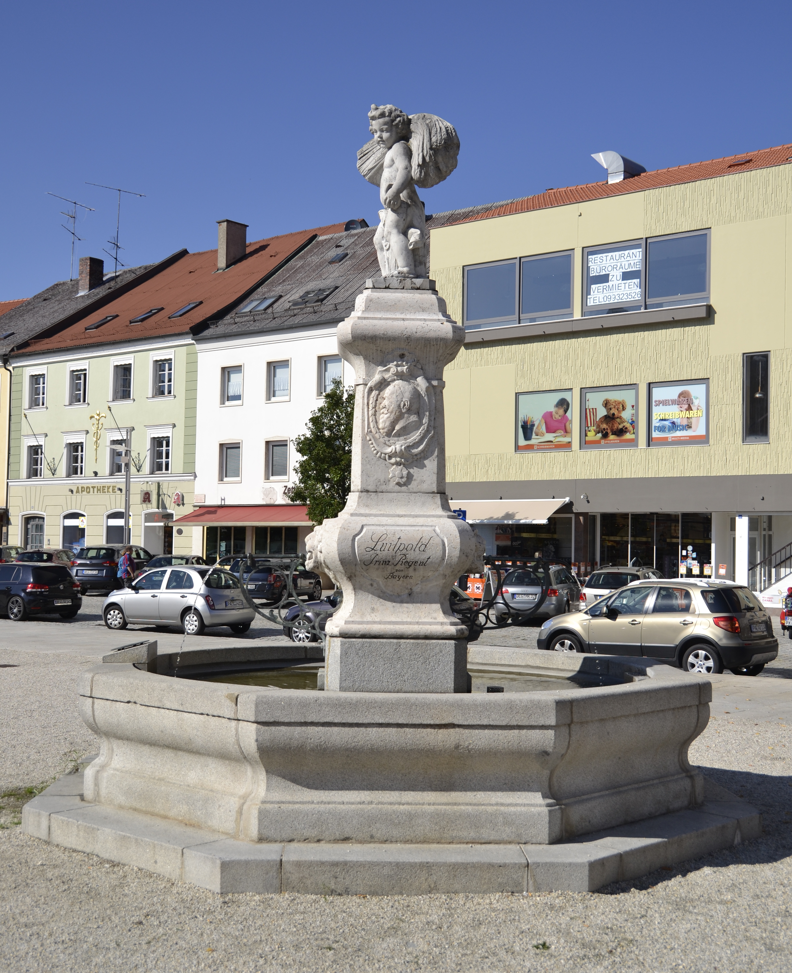 Der Luitpoldbrunnen in Osterhofen.